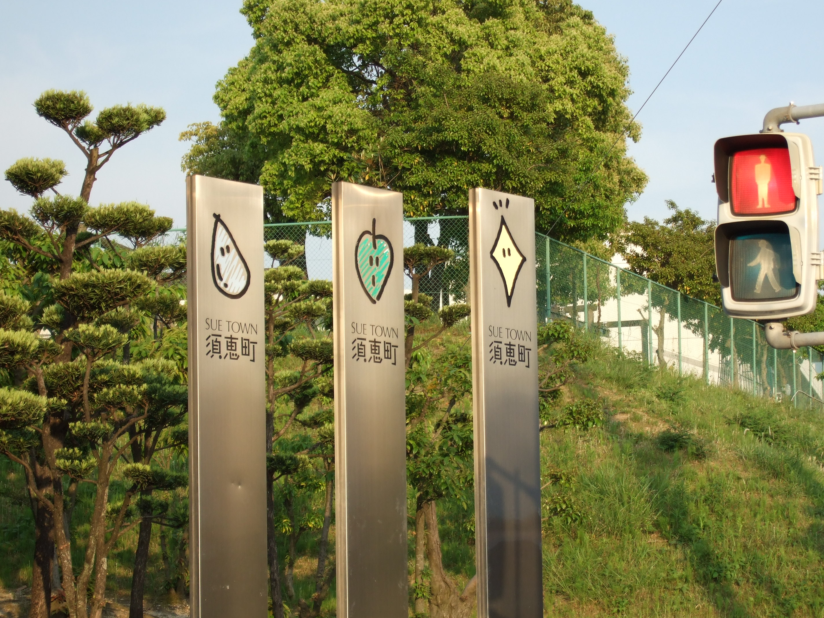 Sue Machi Symbol